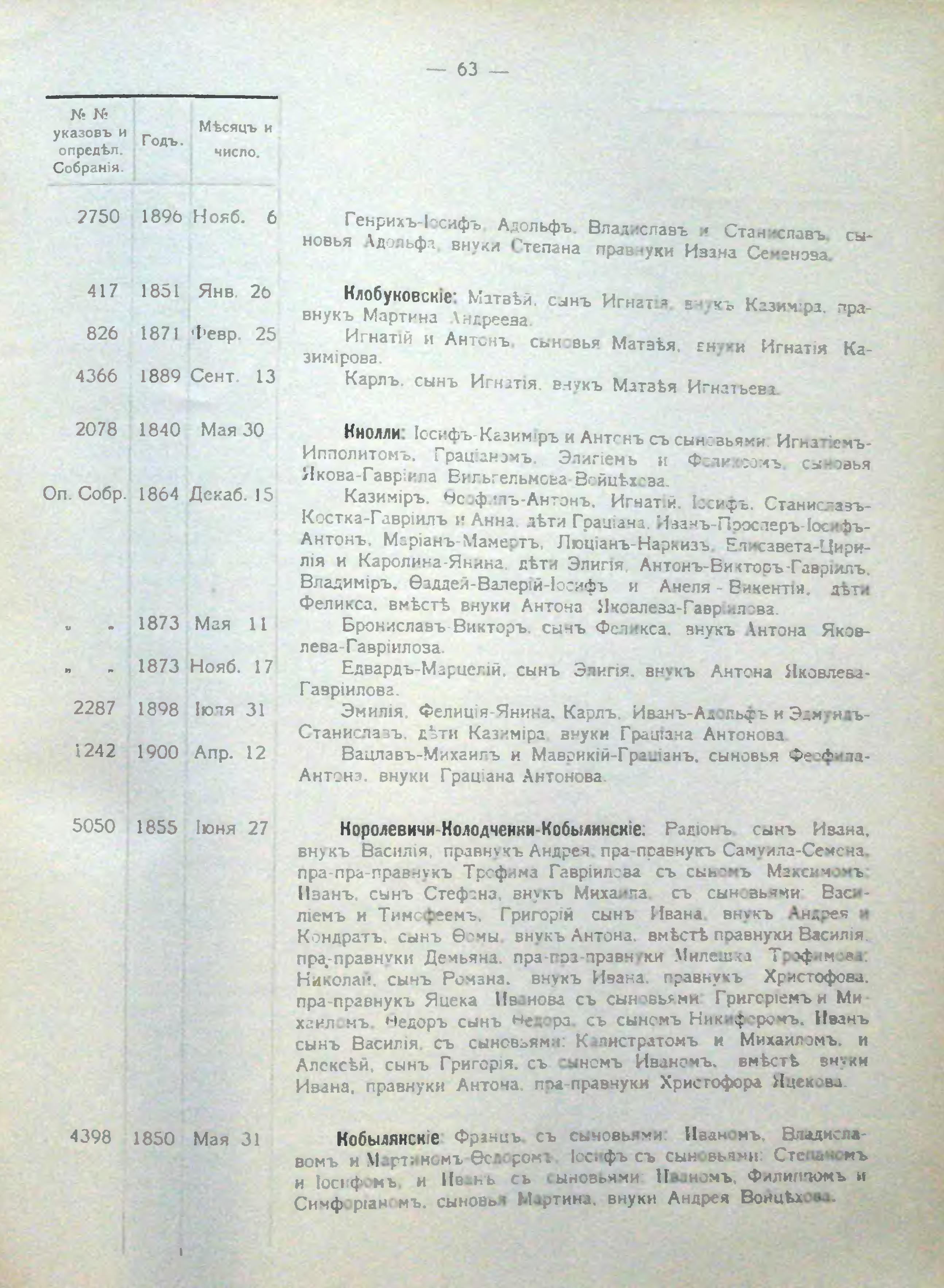 Королевичи-Колодченки-Кобылинские в Списке дворян Волынской губернии, часть 1-ая, стр. 63